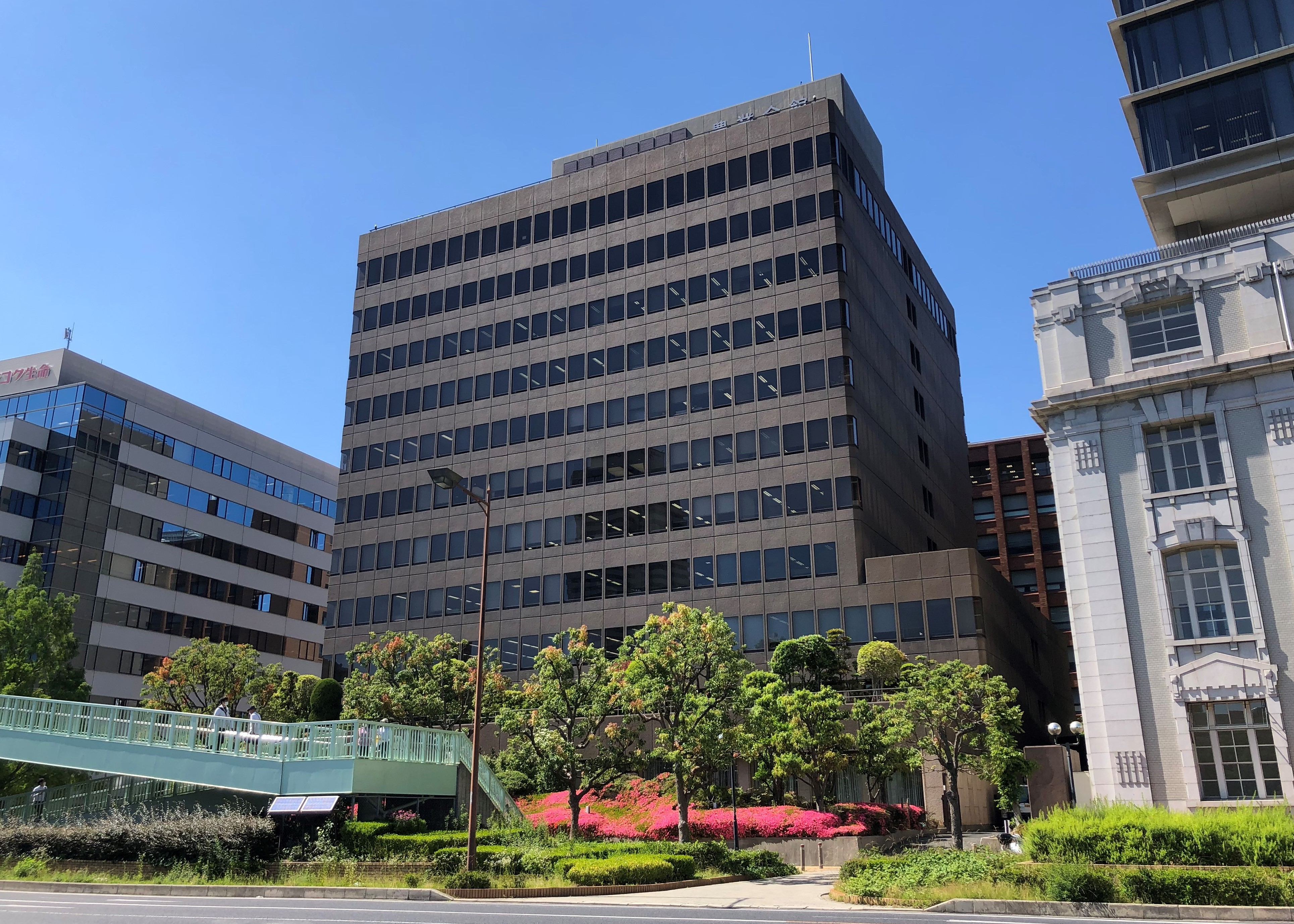 兵庫県農業会館